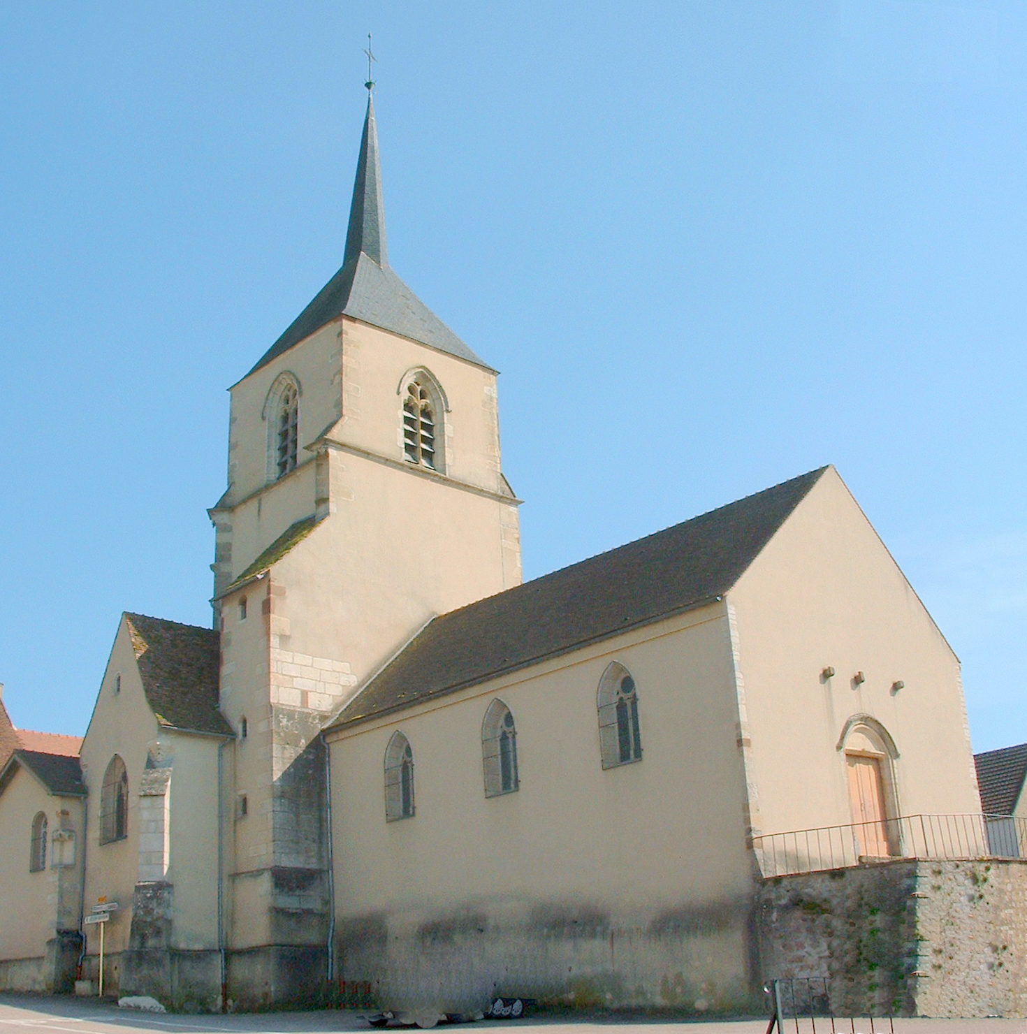 Église de Cussy-les-Forges (Yonne)